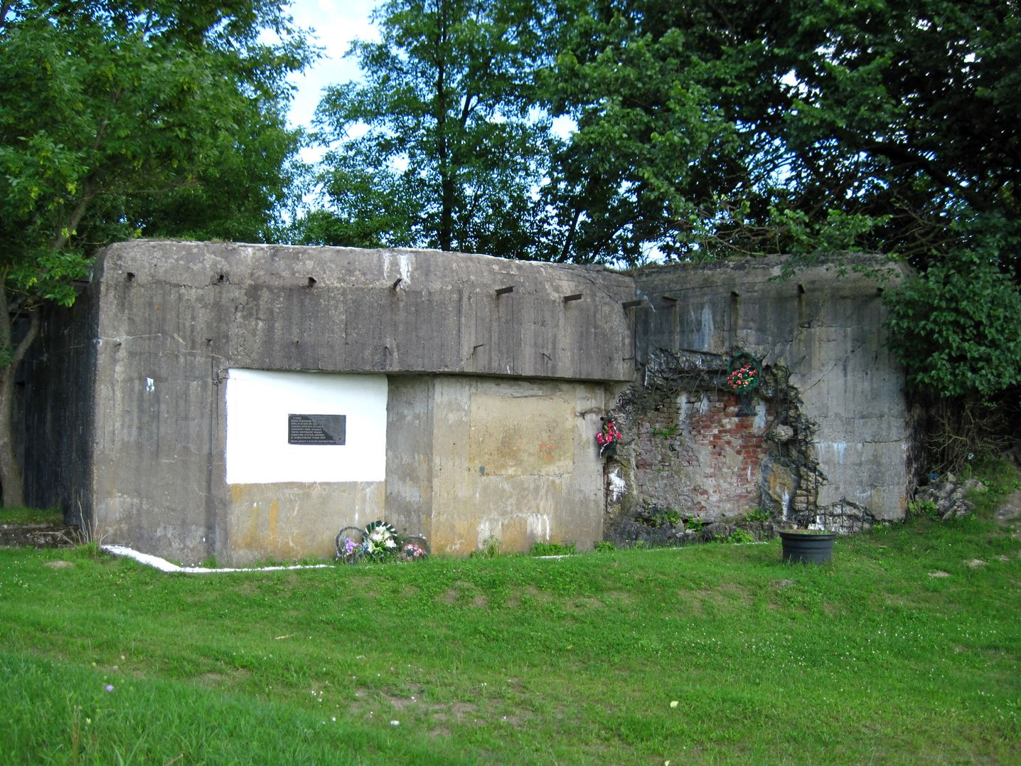 Дот ля Агароднiкаў